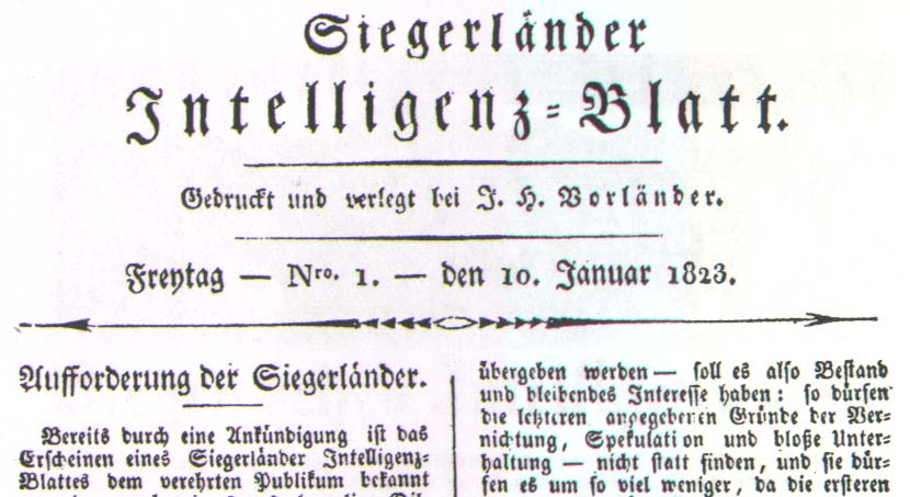 Titel